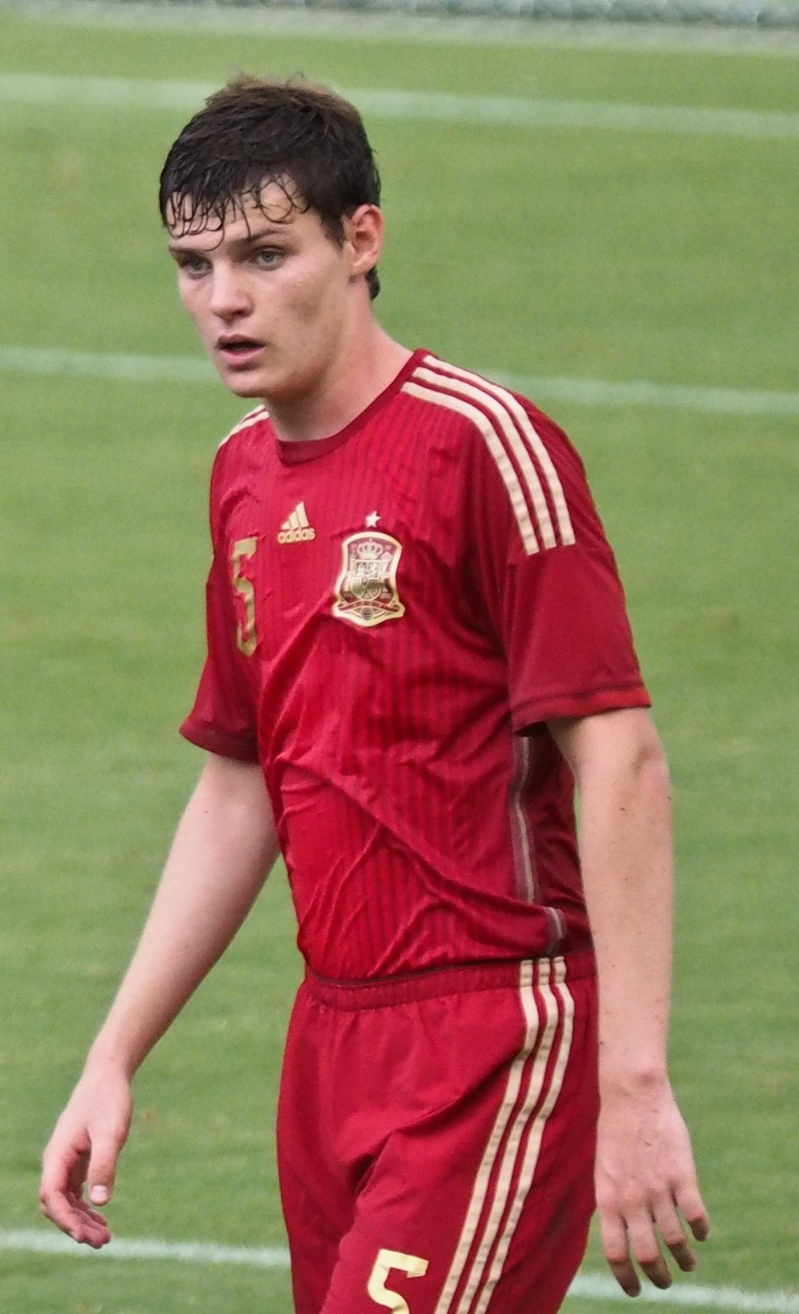 Xiker